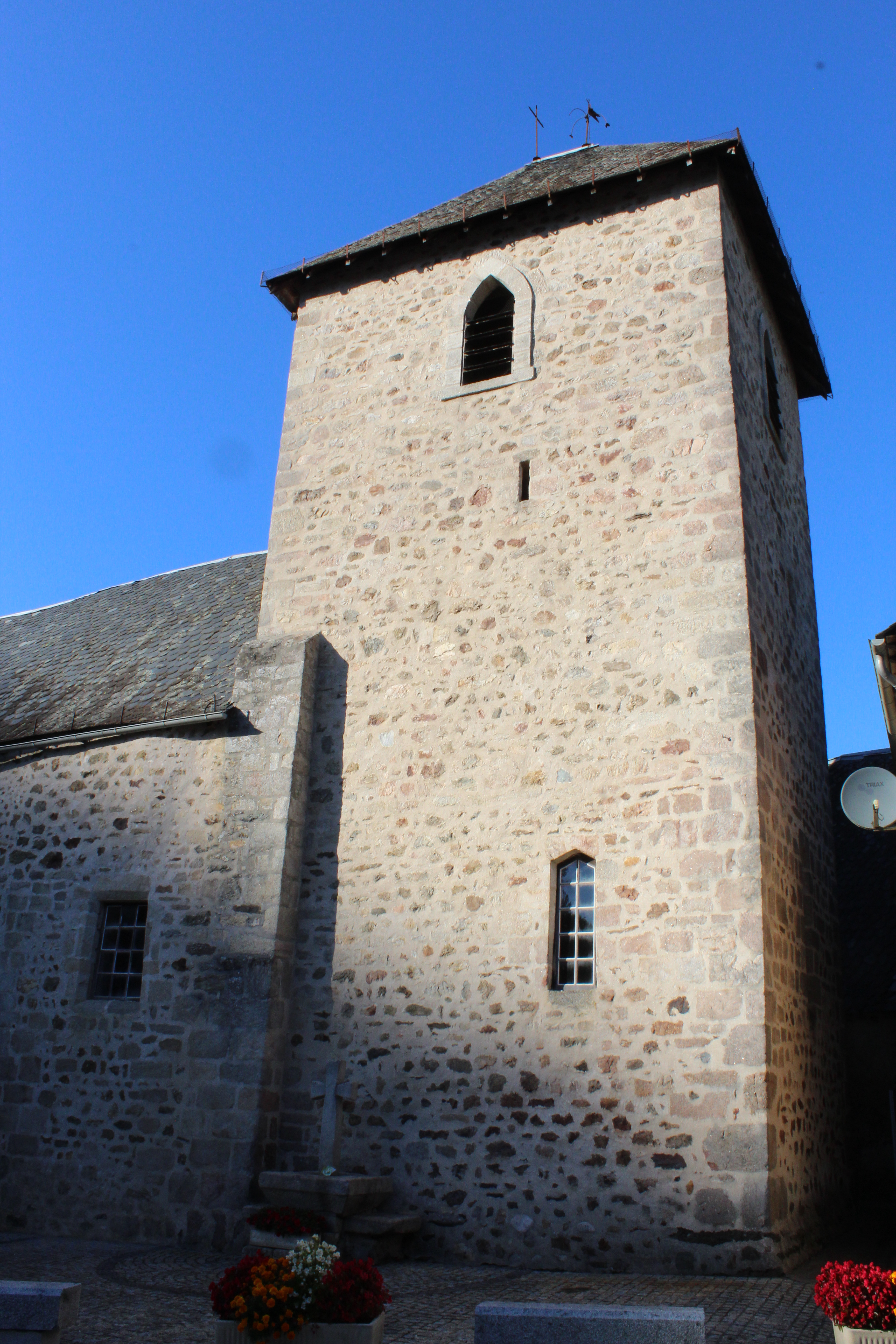 L'église.